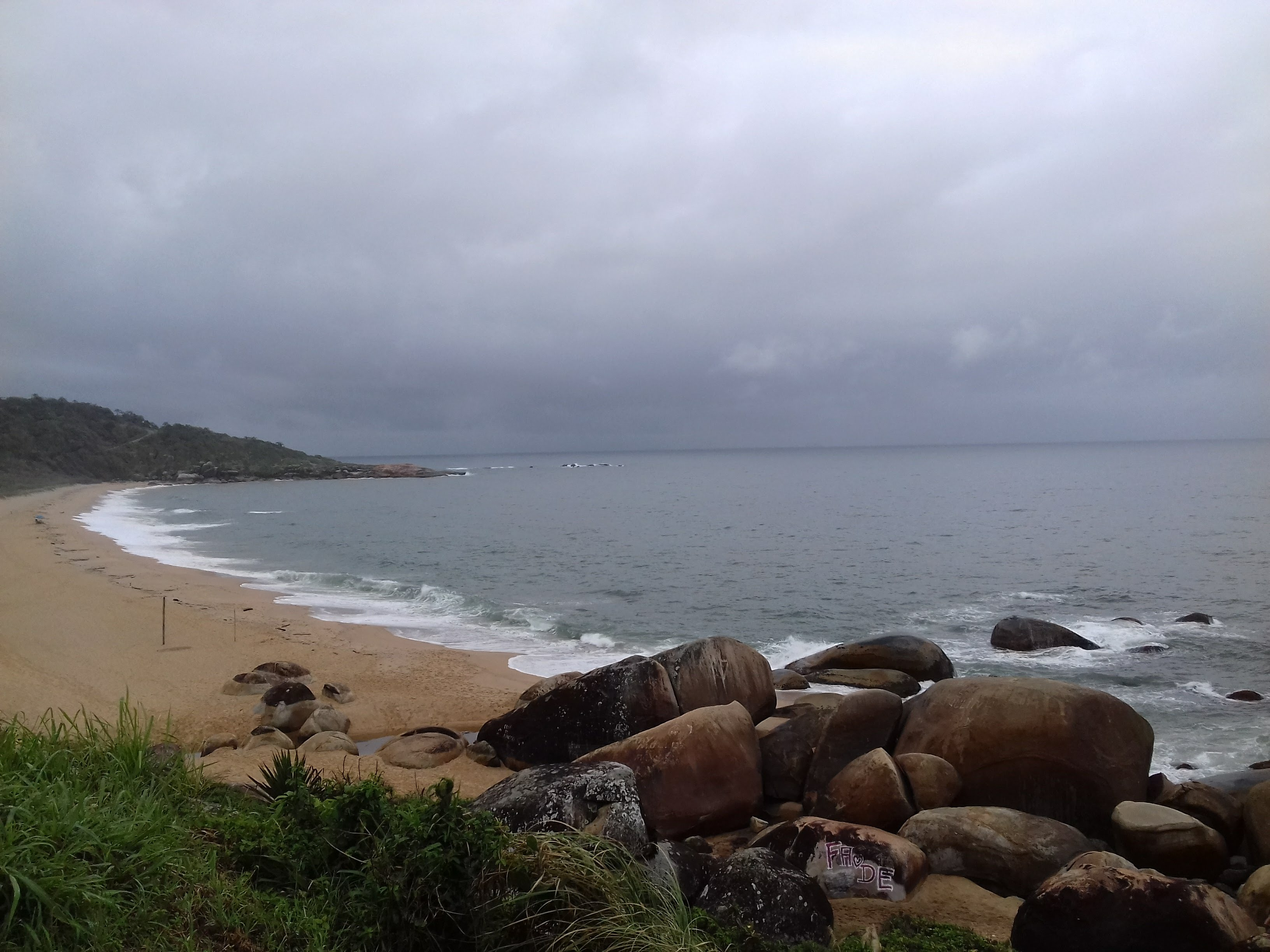 Praia de Ilhota (SC), vista lateral